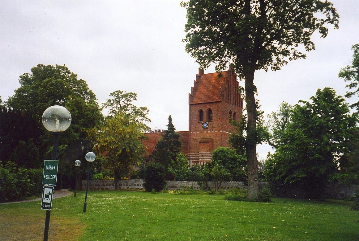 Gladsaxe Kirke, Gladsaxe Sogn, Gladsaxe Kommune